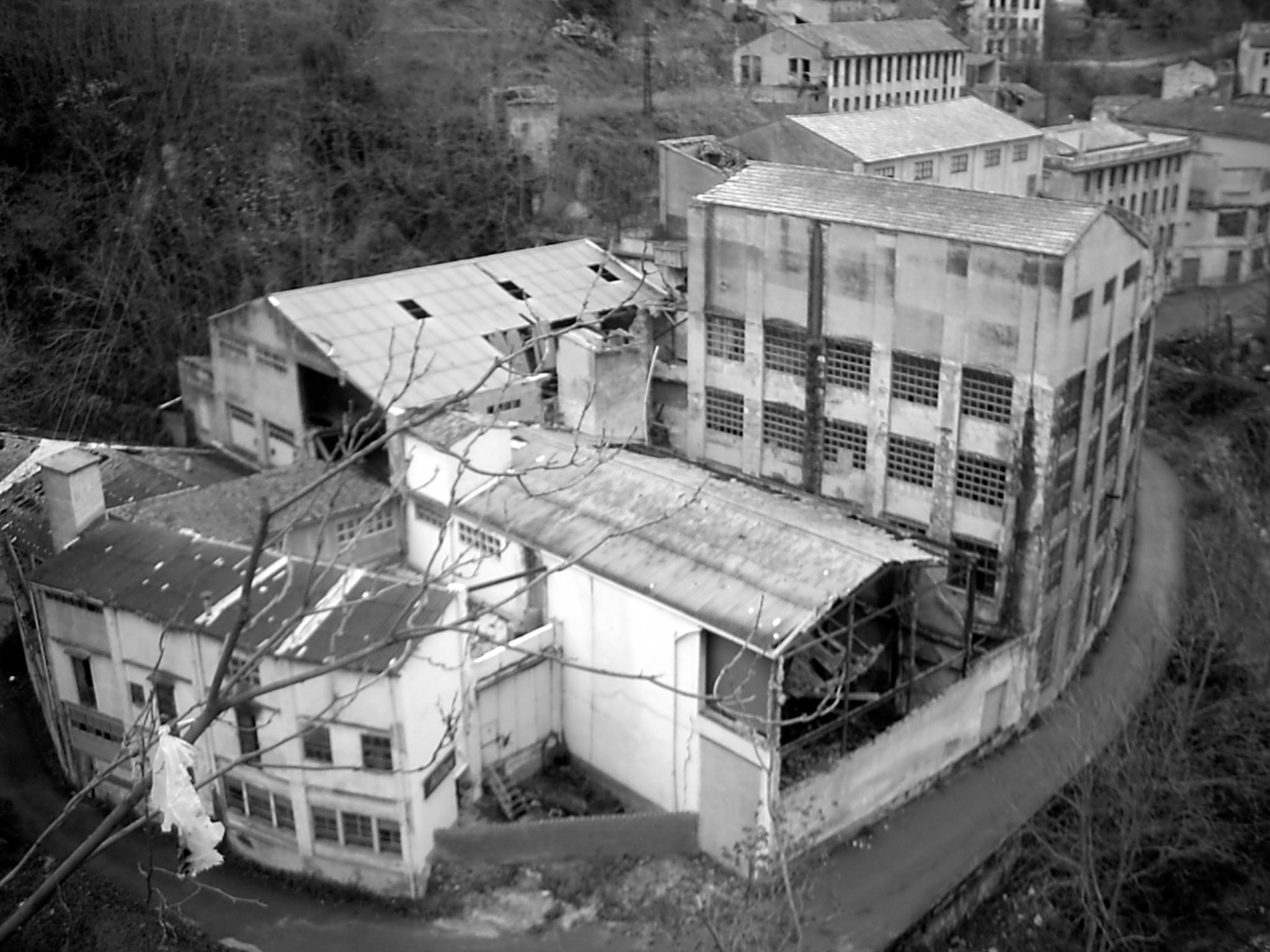 Imatge d'una fàbrica derruïda al Tossal d'Alcoi